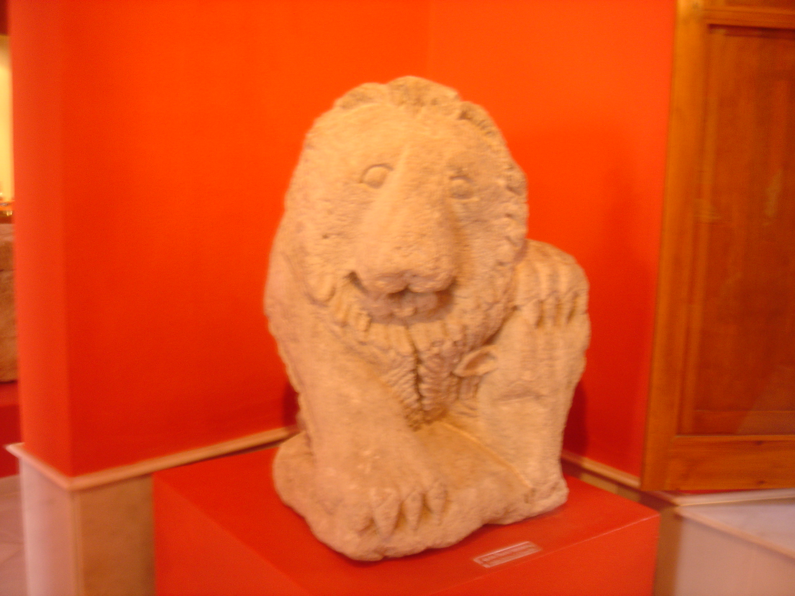 Figura en piedra de un león con un ternero del yacimiento de Esperilla en el Museo de Espera (Cádiz). En este museo se encuentran distintas piezas datadas desde la Prehistoria (hachas, láminas de sílex, cerámica neolítica) hasta la época romana, destacando aquellas provenientes de los yacimientos de Esperilla y Carissa Aurelia: piezas zoomórficas iberorromanas, monedas, cerámicas, amuletos...